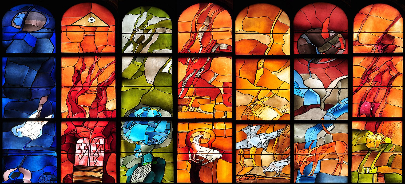 Zusammenstellung Glasfenster im Hochchor